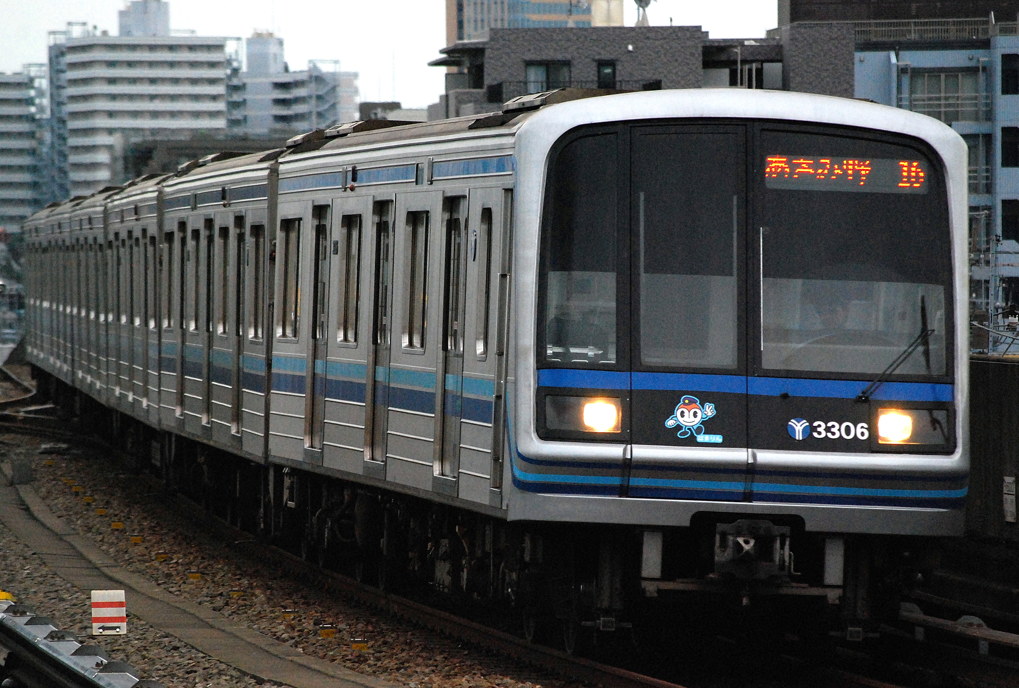 横浜市営地下鉄3000A系(新羽駅で撮影）